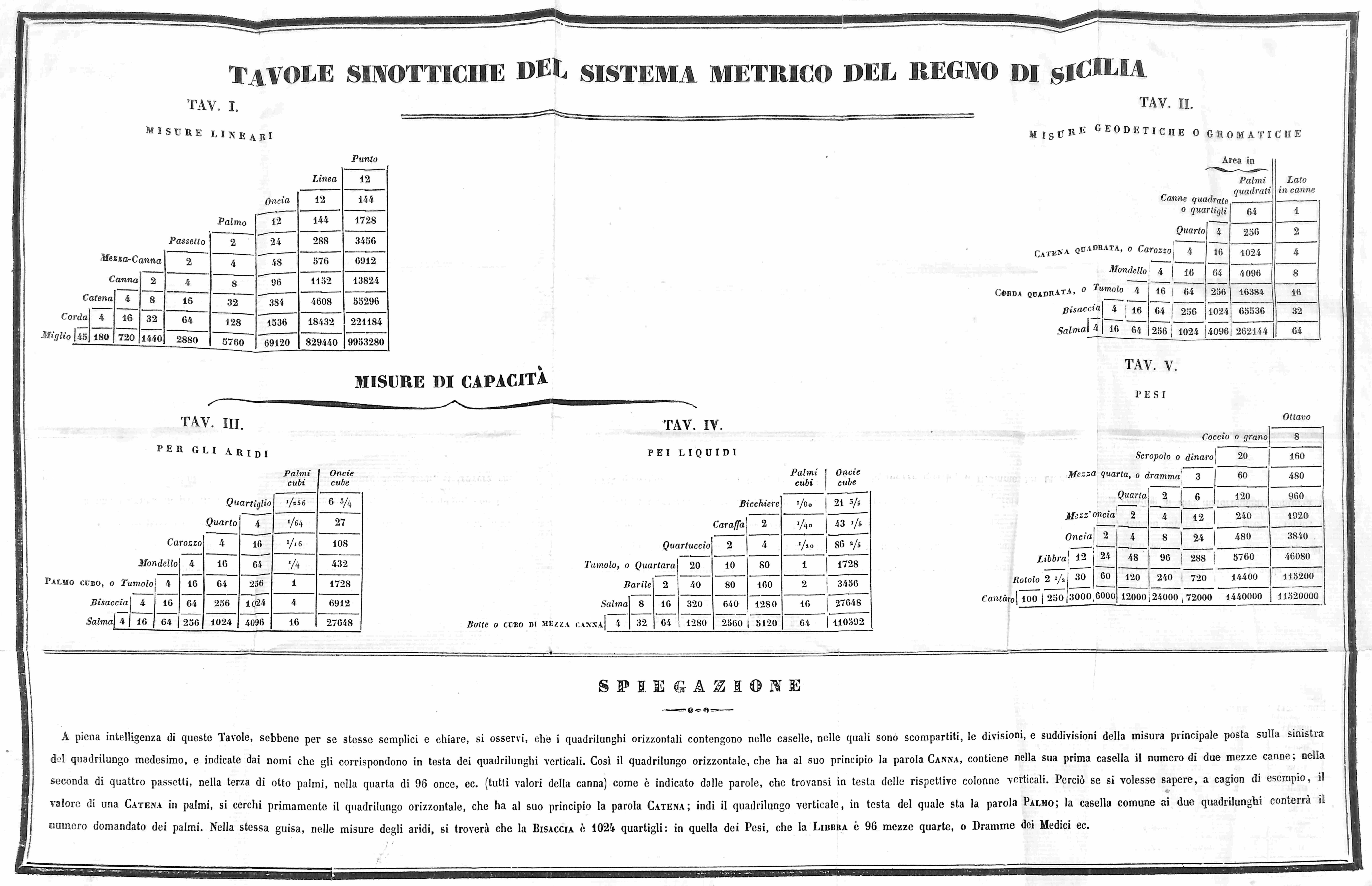 Tavole sinottiche del sistema metrico del Regno di Sicilia